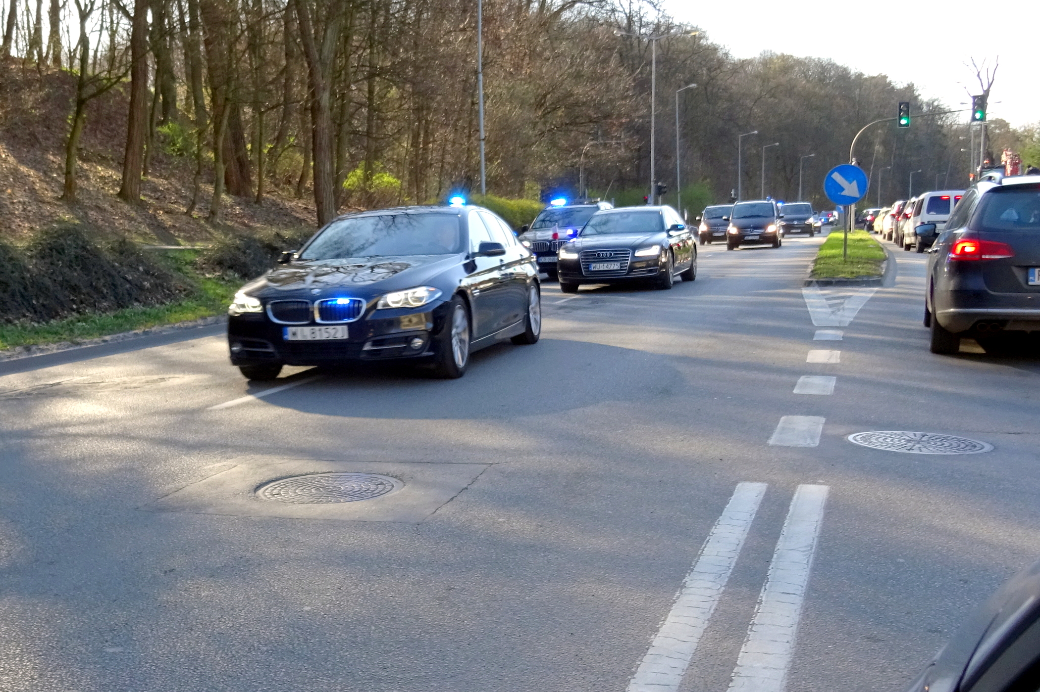 Przejazd Prezydenta Rzeczypospolitej Polskiej w kolumnie samochodów Służby Ochrony Państwa. Prezydent przewożony jest w limuzynie Audi A8L Security (Gorzów Wlkp., ul. Słowiańska)